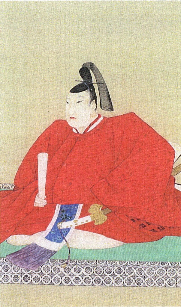 奥平昌男の肖像。